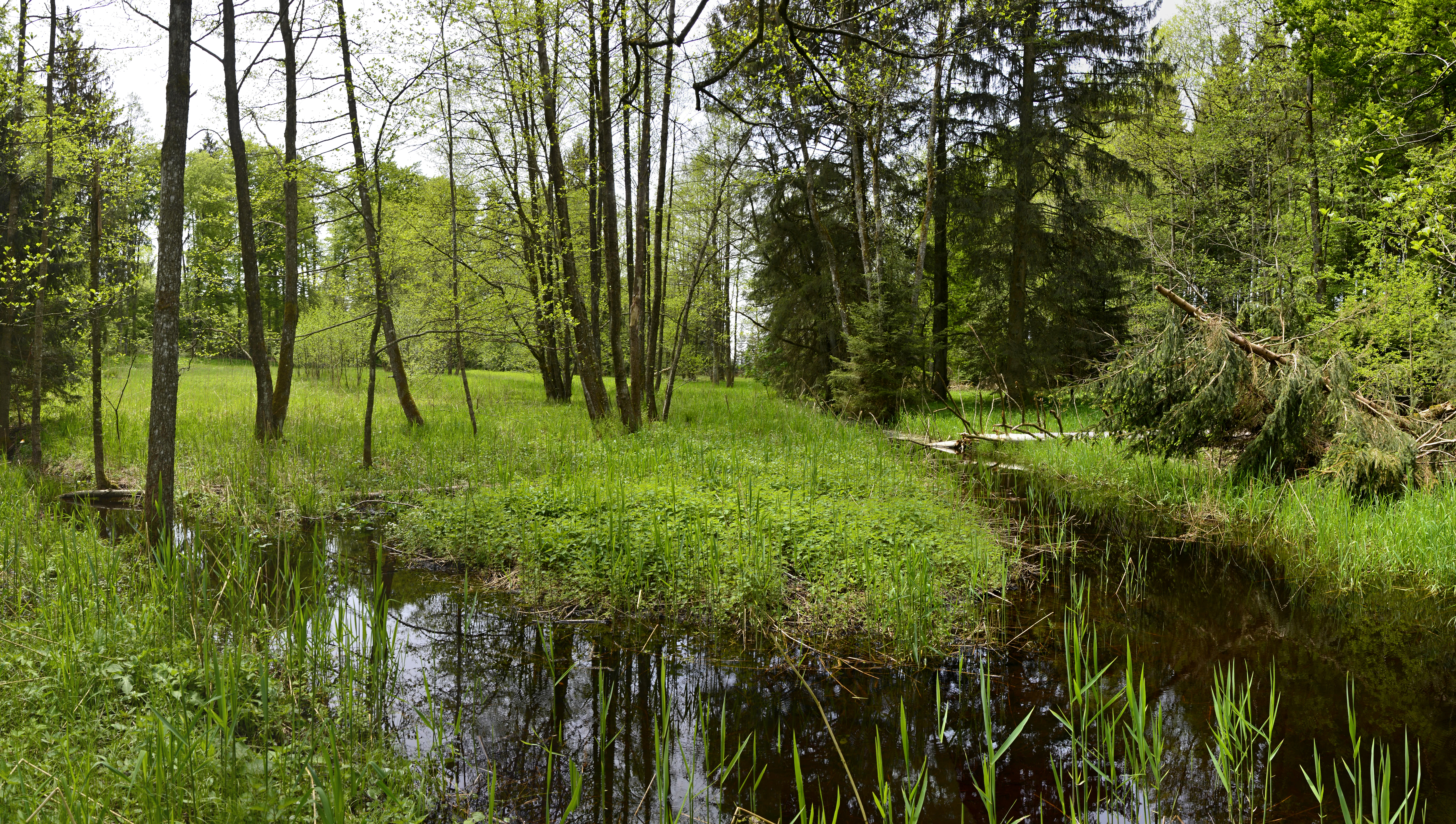 NSG Lochmoos. Rückstaugräben mit Schwarzerlenbestockung.